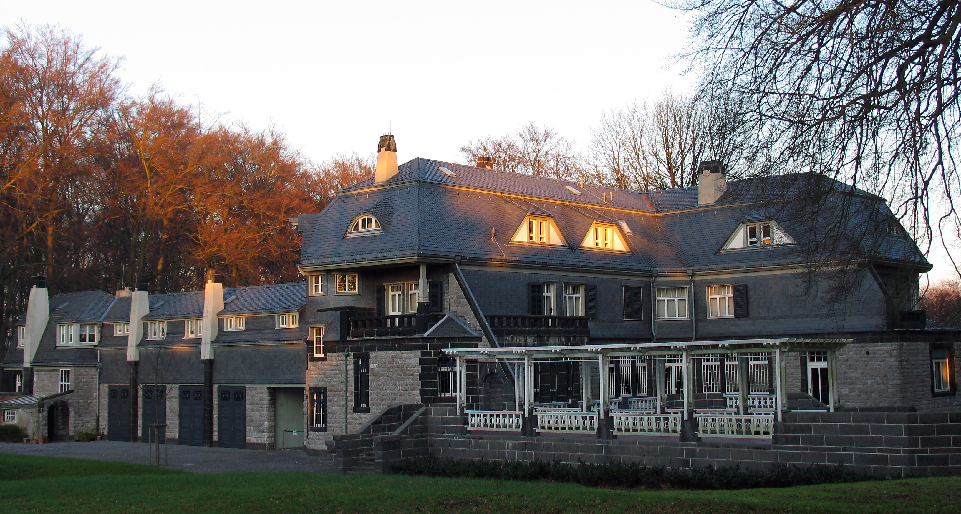 Hohenhof Hagen, from Garden